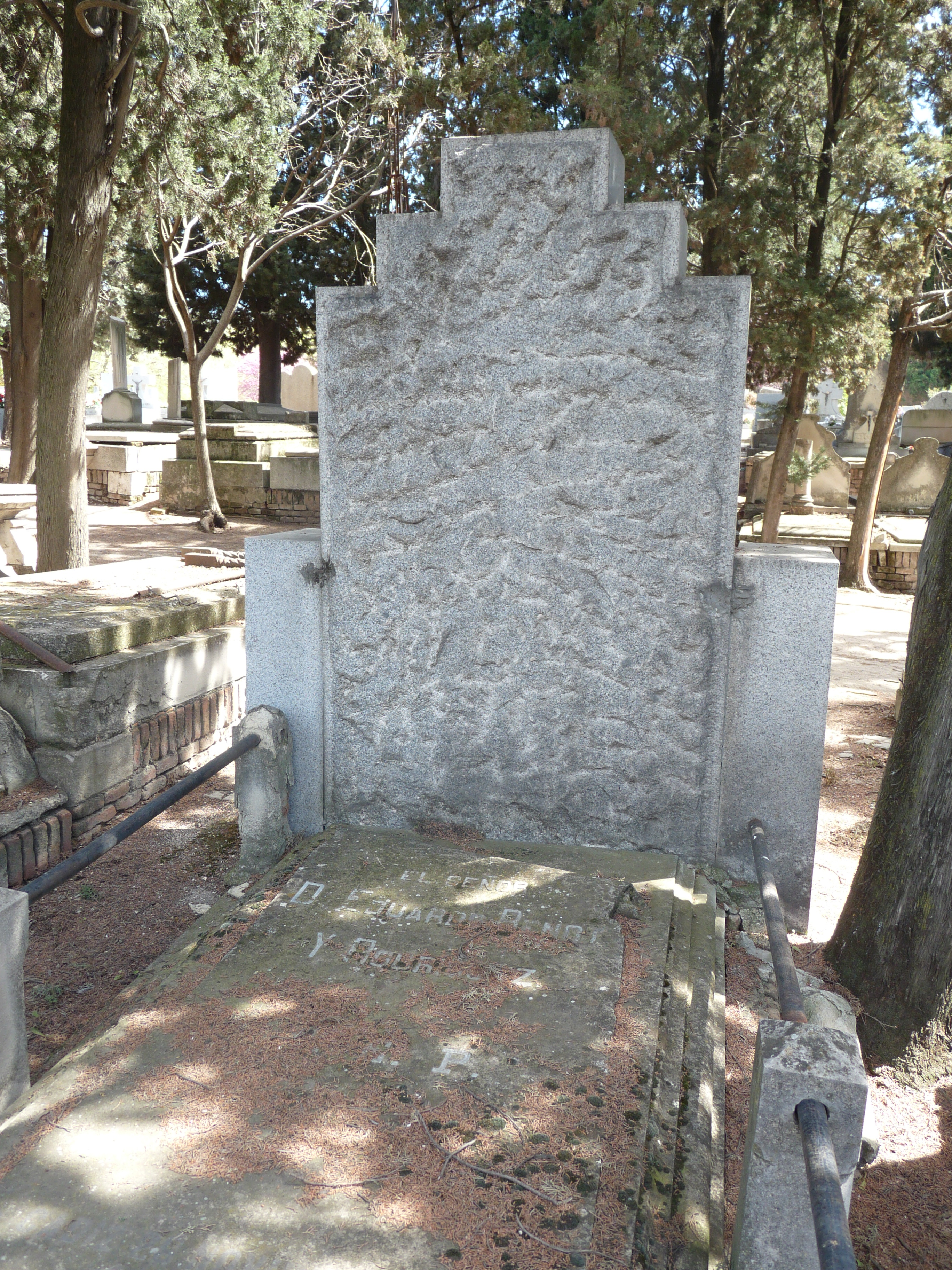 Tumba de Eduardo Benot y Rodríguez en el cementerio civil de Madrid.